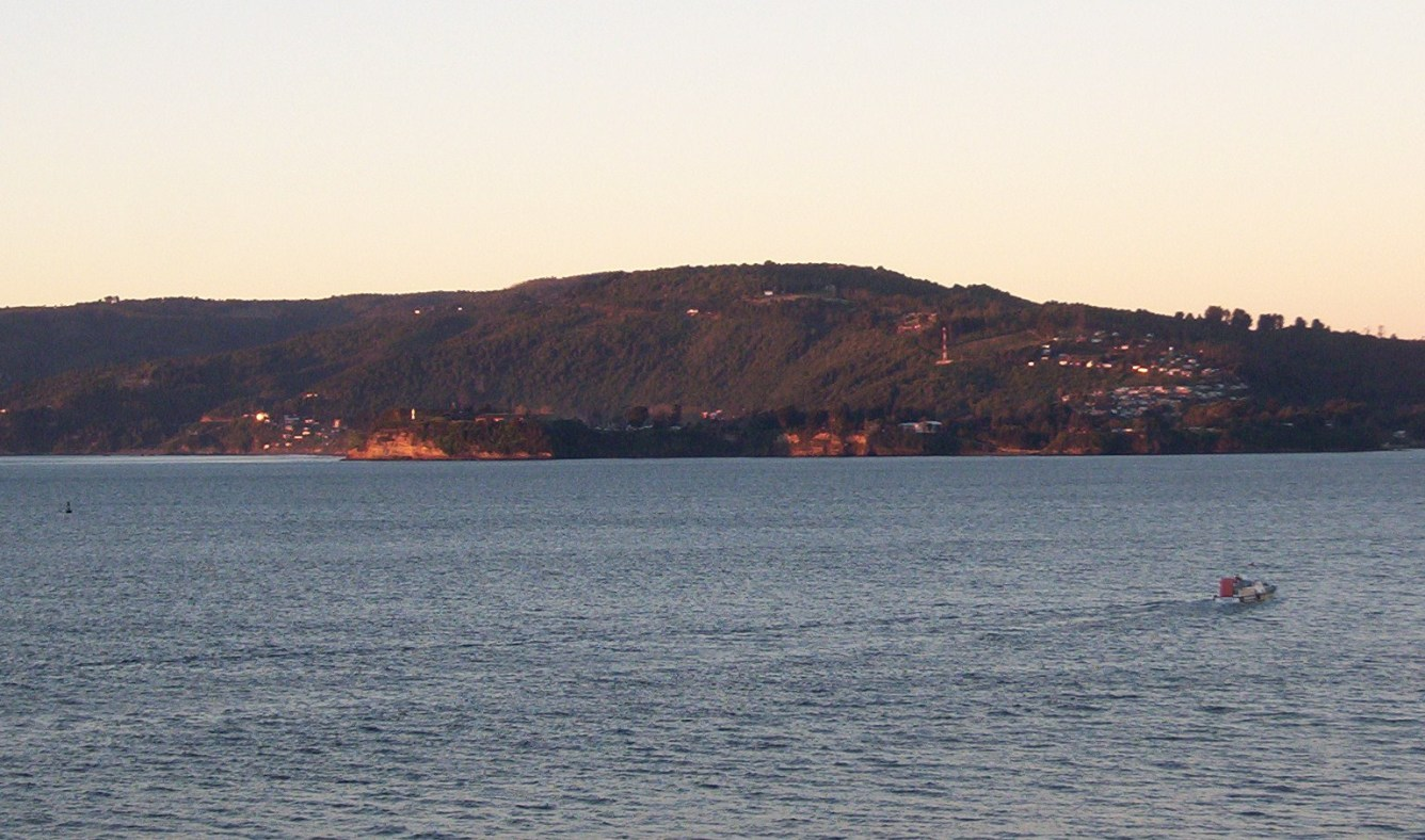 Atardecer en Niebla, Valdivia, Chile. Foto tomada desde Corral. El promontorio en que se emplaza el fuerte de Niebla a la izquierda.